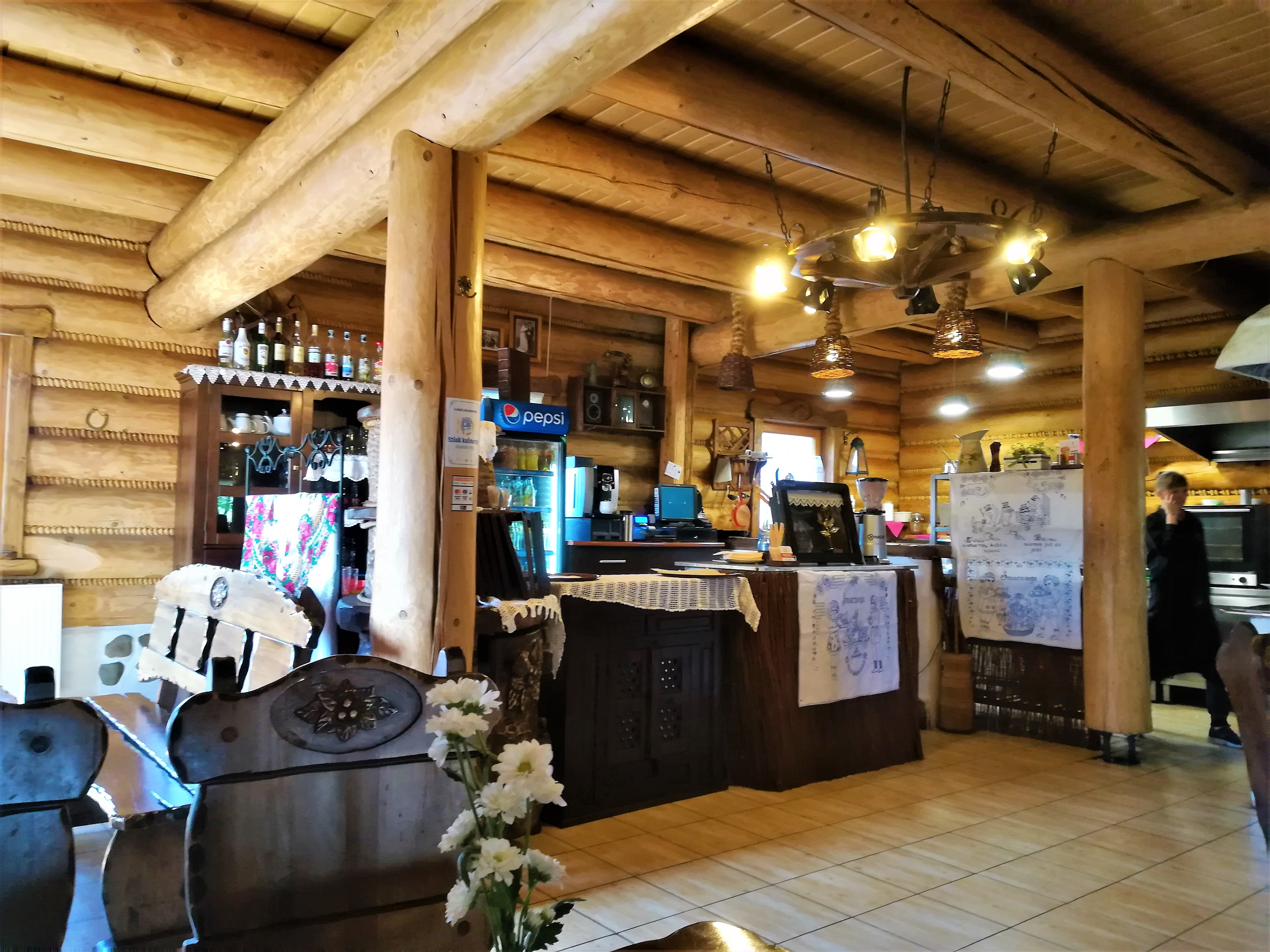 Karczma Zapiecek w Mirowszczyźnie.